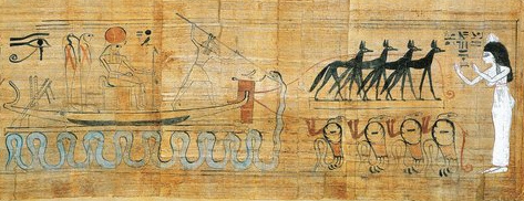 Représentation de la barque solaire de Rê tirée par des chacals et des serpent. L'embarcation est attaquée par le serpent Apophis mais ce dernier est transpercé par Seth. Papyrus funéraire de Hérouben.